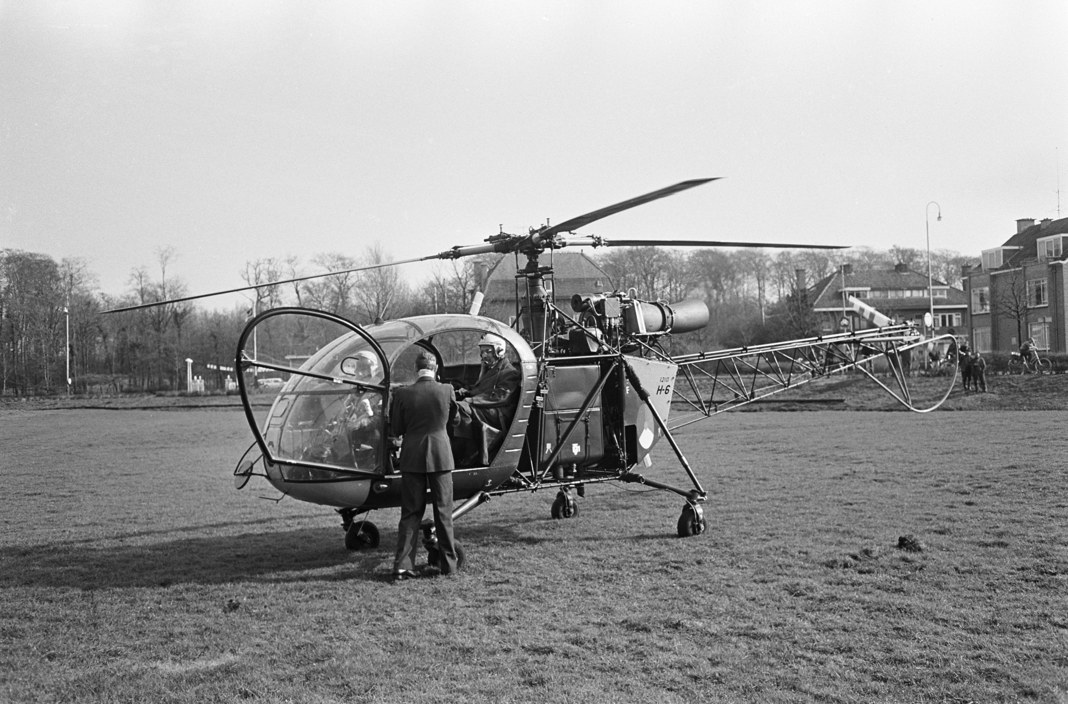 Collectie / Archief : Fotocollectie Anefo Reportage / Serie : [ onbekend ] Beschrijving : Vliegende formateur mr. Cals met helicopter naar Paleis Soestdijk , mr. Cals met helm en tas Datum : 9 april 1965 Trefwoorden : formateurs, helicopters Persoonsnaam : Cals, Jo Fotograaf : Koch, Eric / Anefo Auteursrechthebbende : Nationaal Archief Materiaalsoort : Negatief (zwart/wit) Nummer archiefinventaris : bekijk toegang 2.24.01.05 Bestanddeelnummer : 917-6349